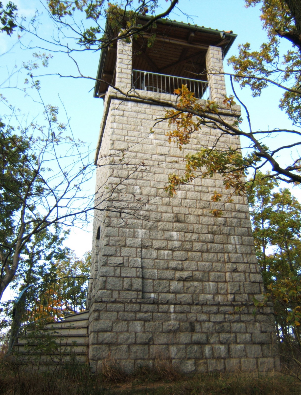 Homburgswarte am 22.10.2005 beim Wikipedia:Wandertag aufgenommen